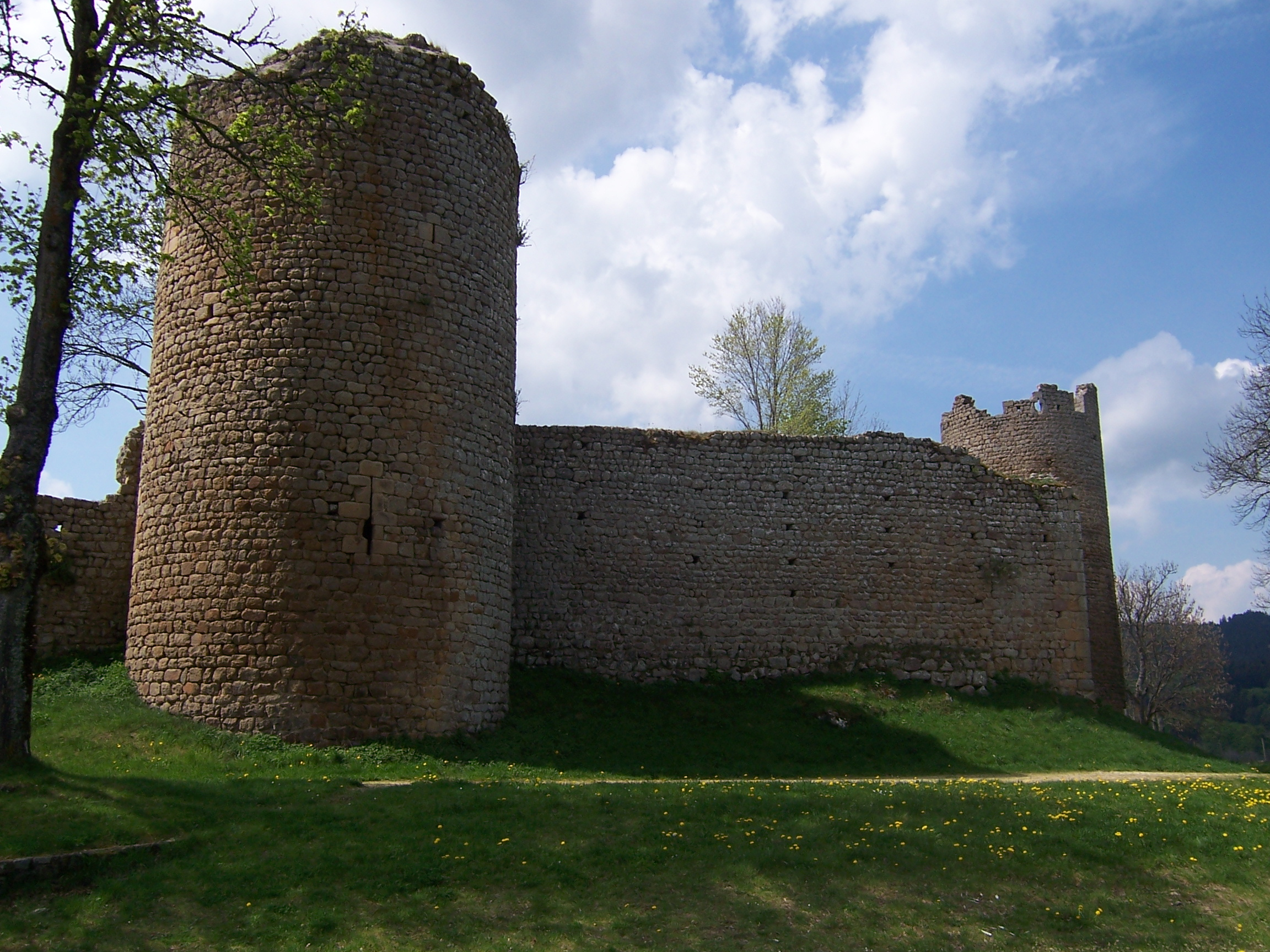 Chateau de Viverols